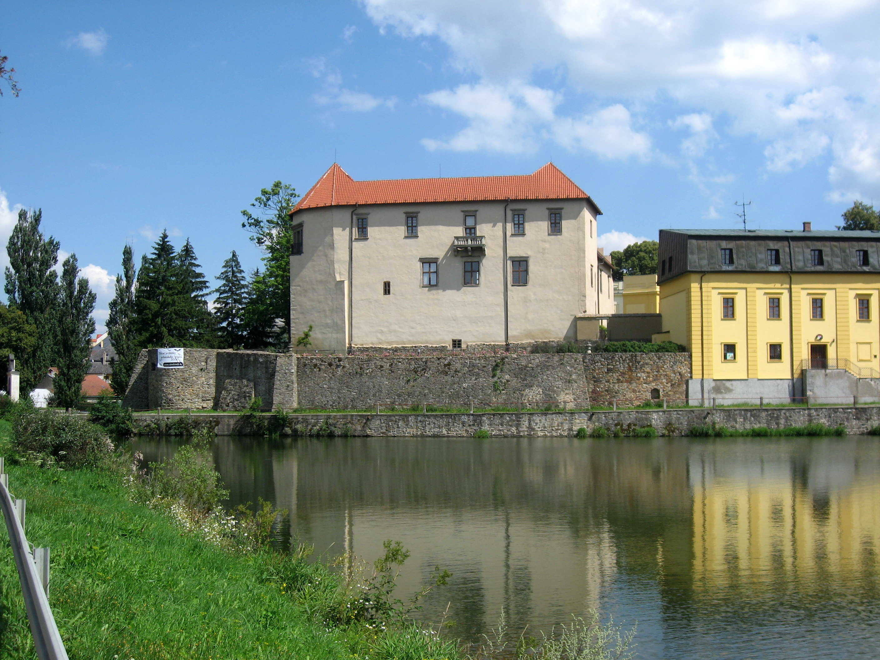 Polná, hrad